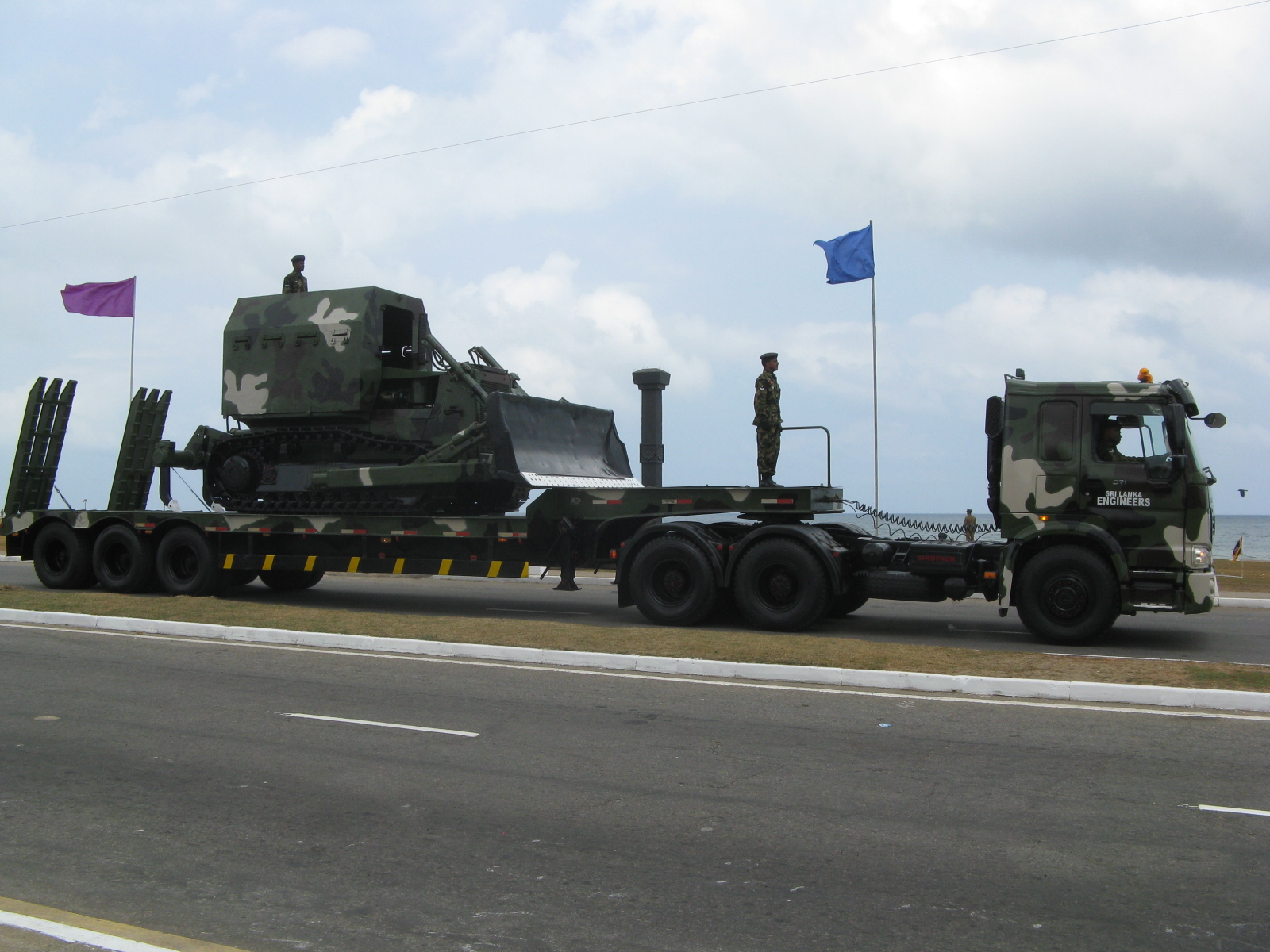 Military Bulldozer - Sri Lanka Army